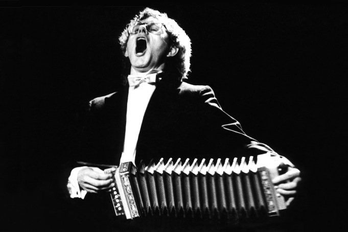 Osy Zimmermann (*1946) Schweizer Sänger, Musiker, Schauspieler